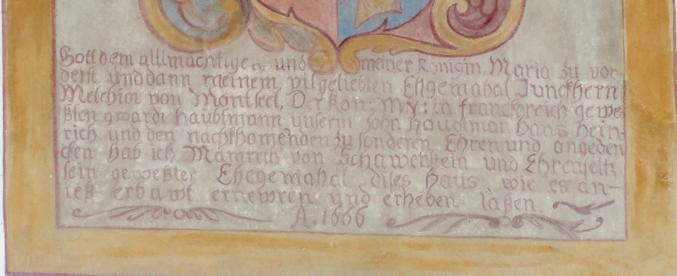 Schloss de Mont Wandbild an der Ostseite